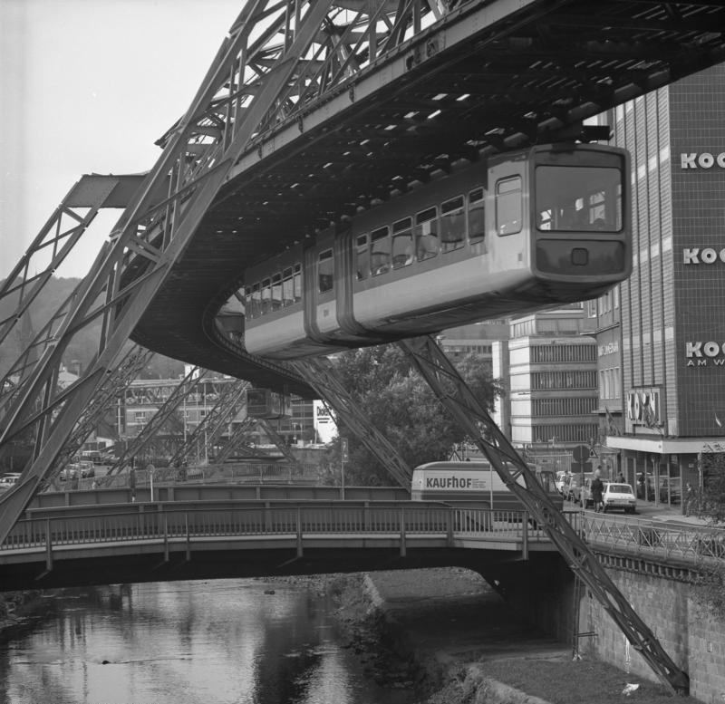 Wuppertal: Schwebebahn in Elberfeld